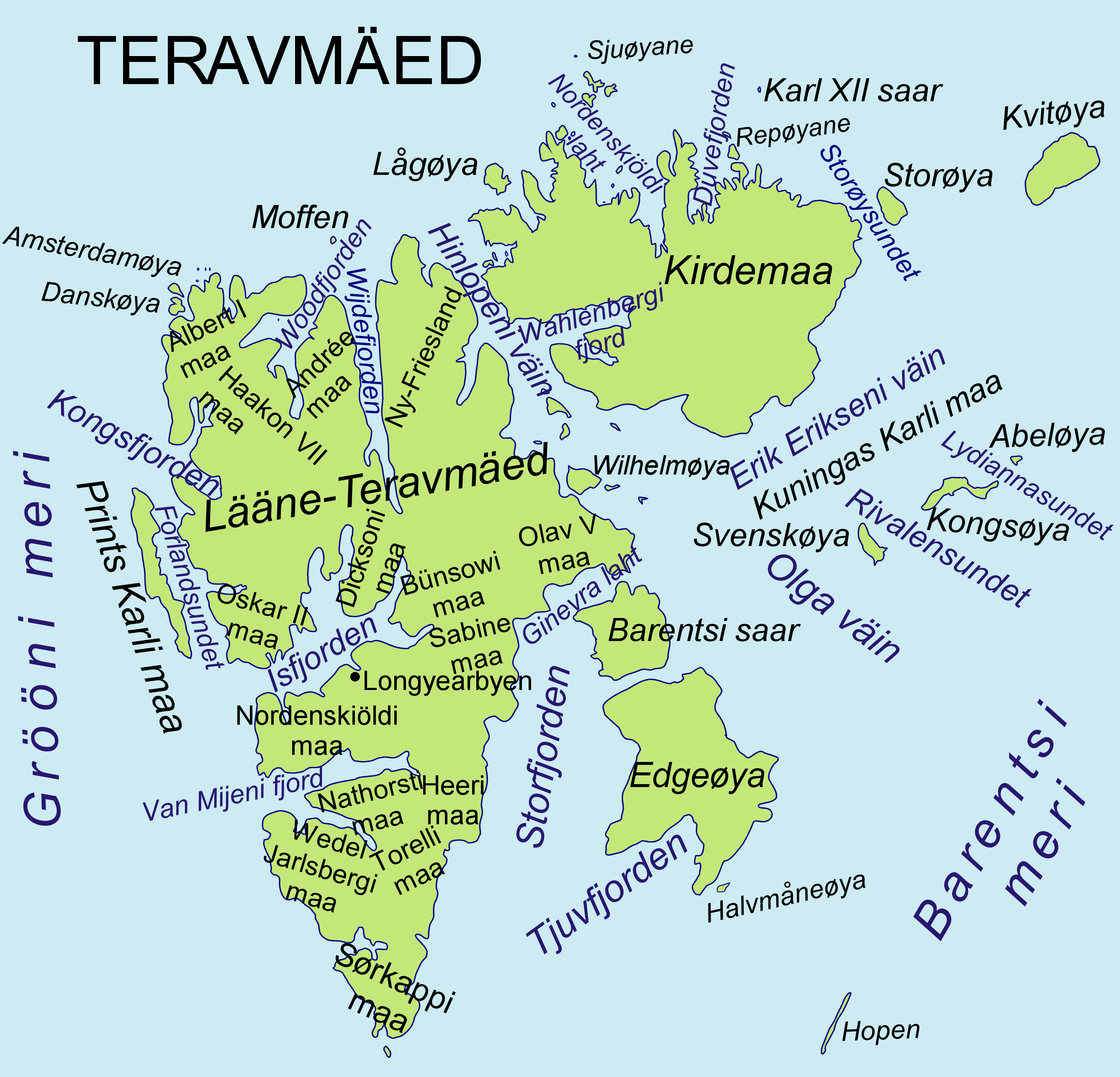 Teravmägede kaart